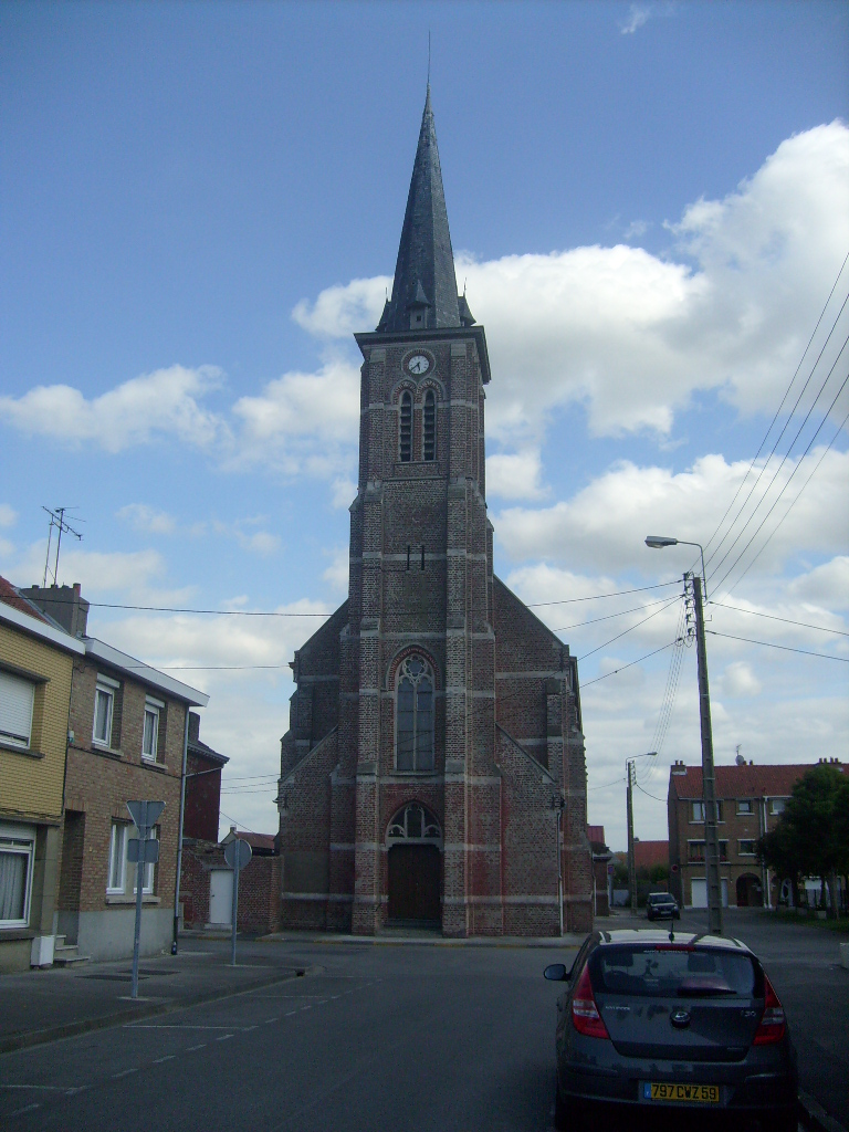 Église de Hoymille